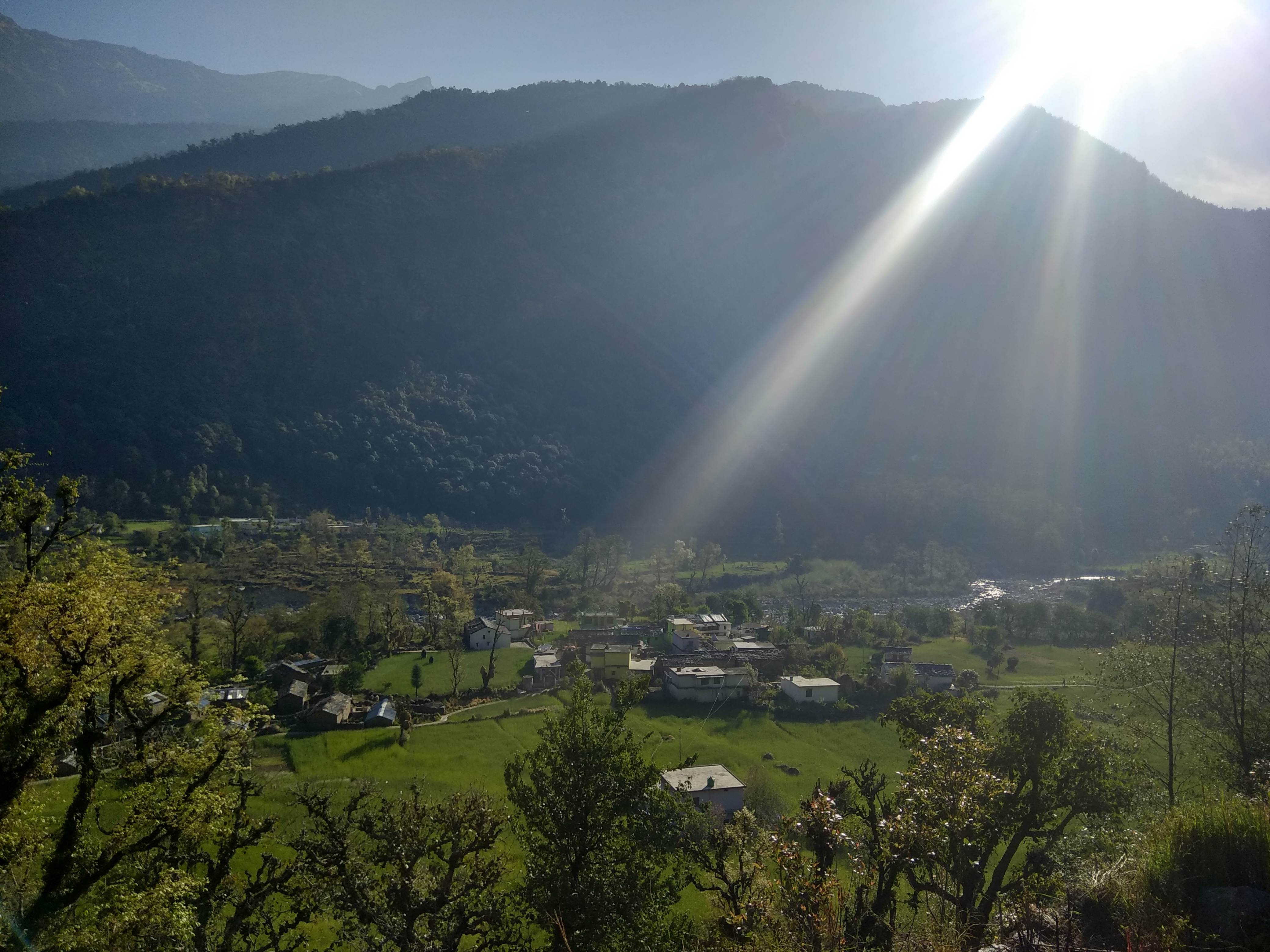 मण्डल गाव का सुन्दर द्रश्य